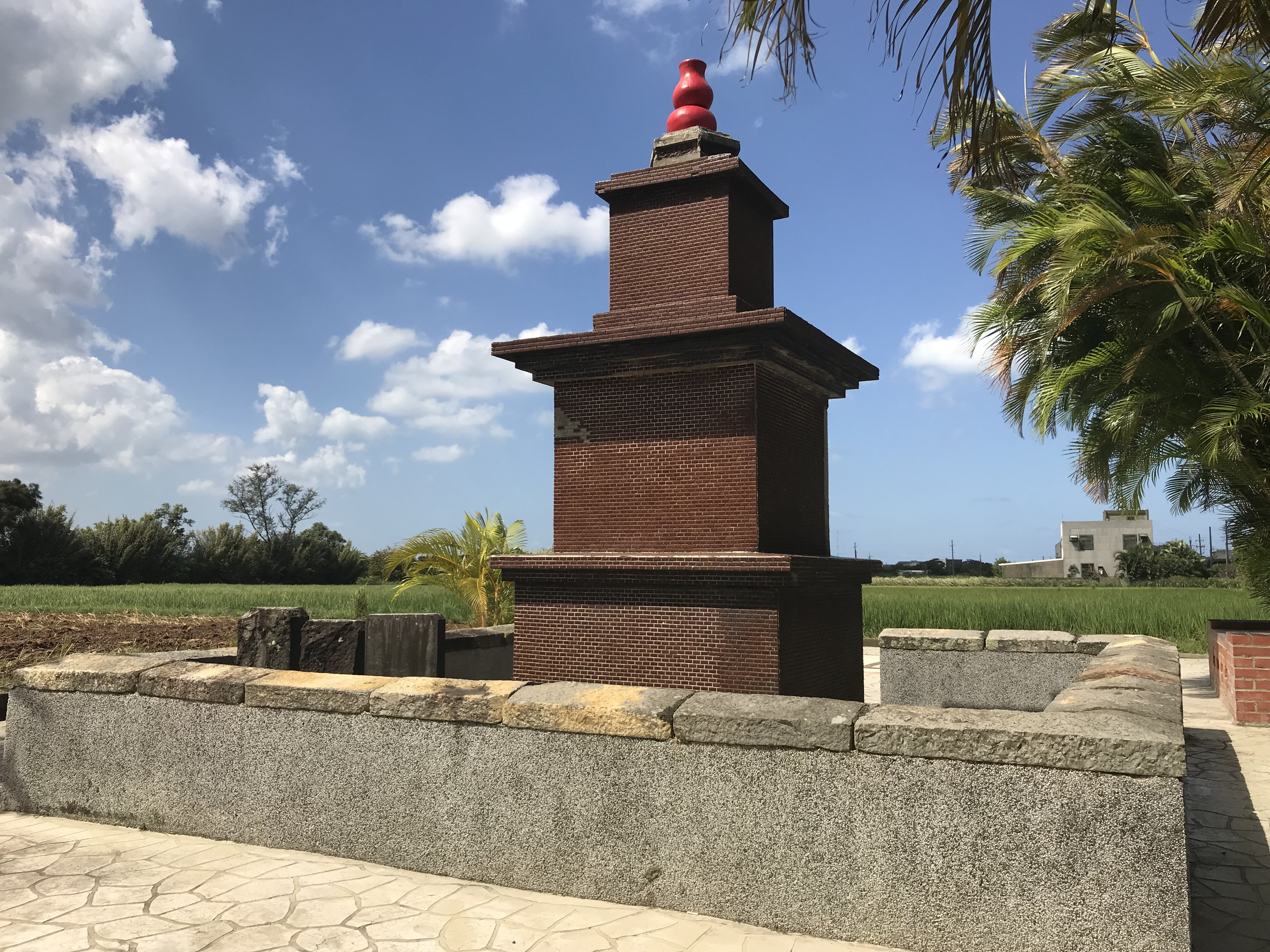 中文（台灣）: 新豐扶雲社孔聖亭背後照